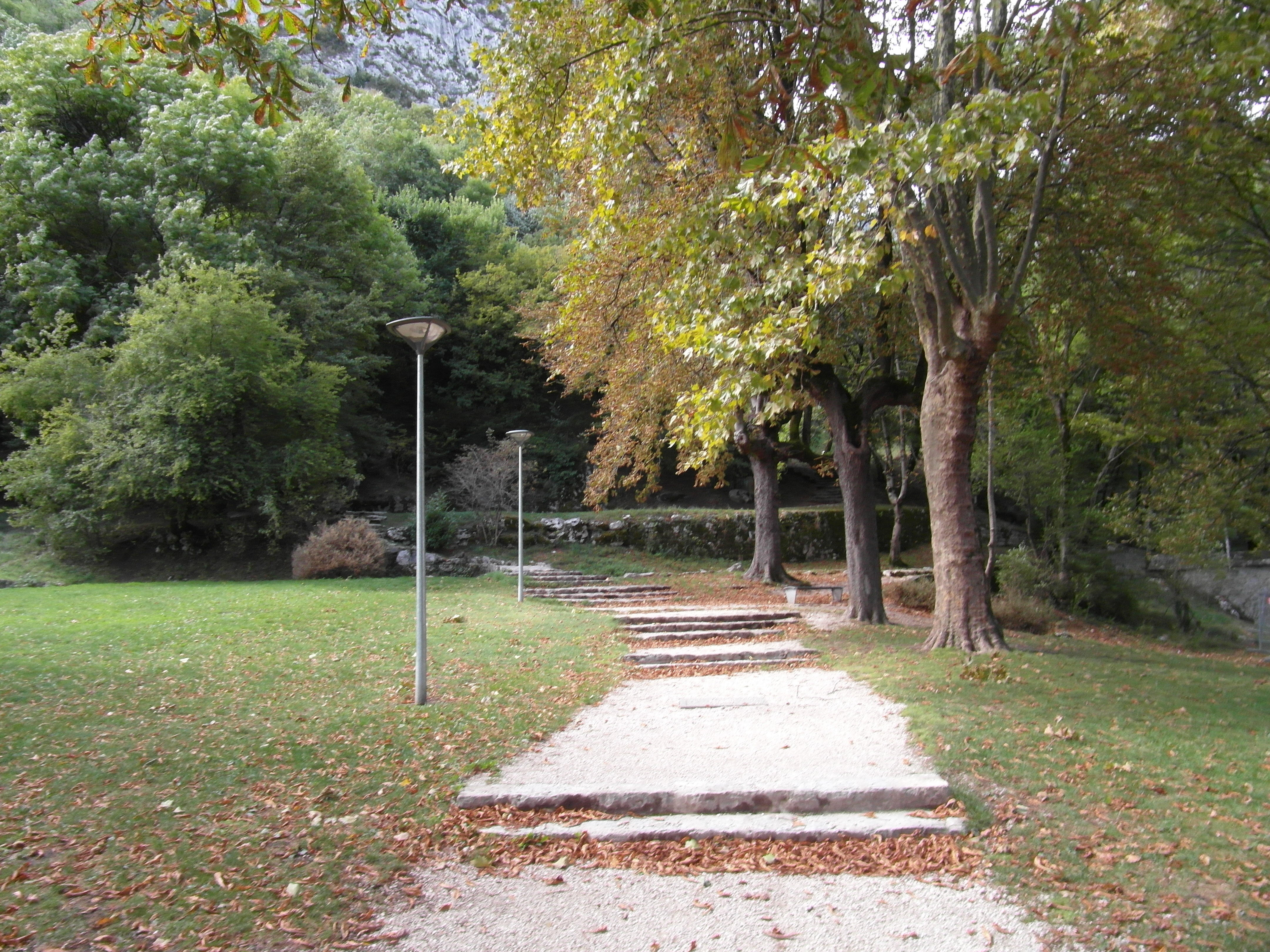 Parc des Cuves de Sassenage